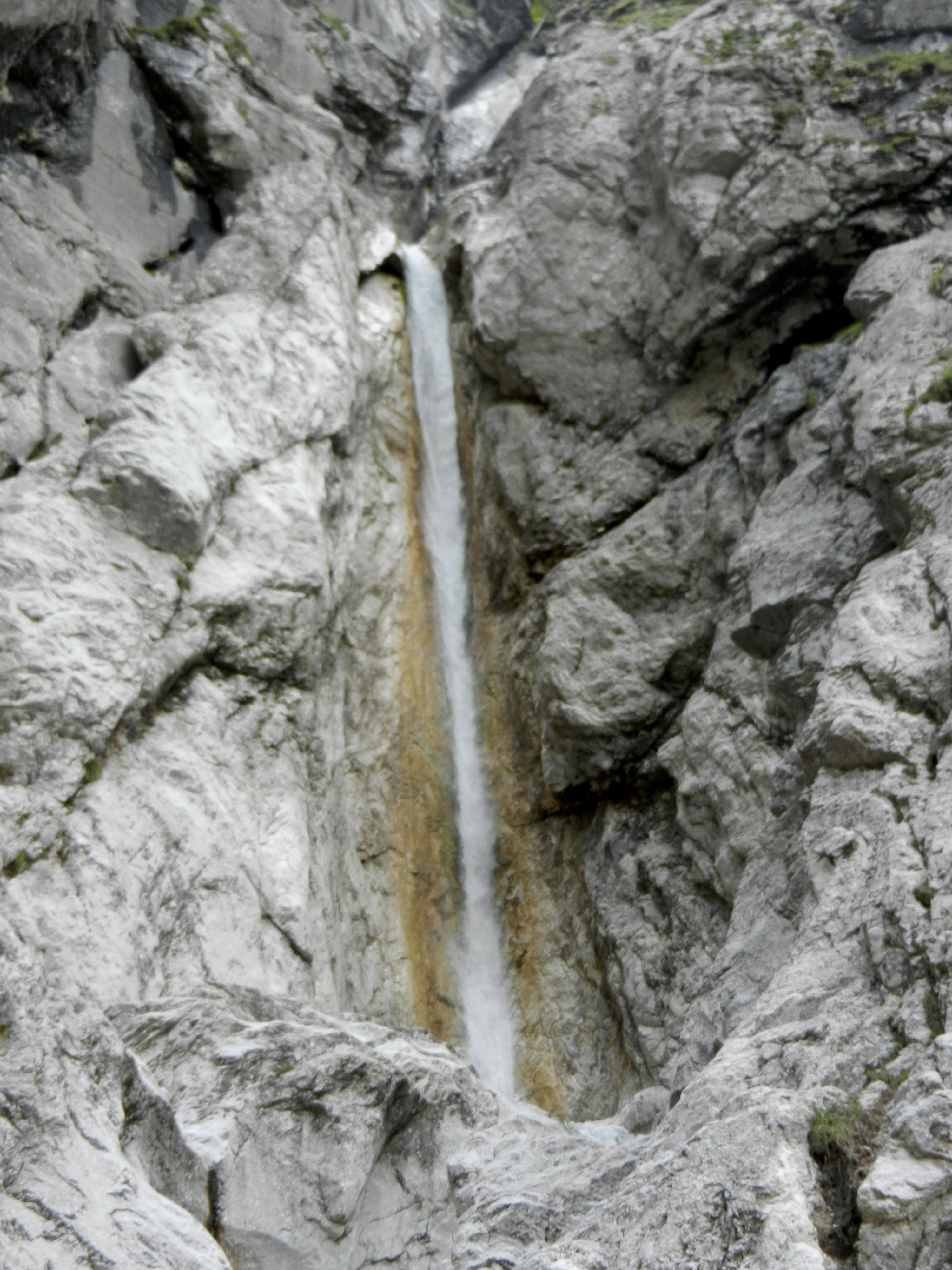 Zgornji Martuljški slap